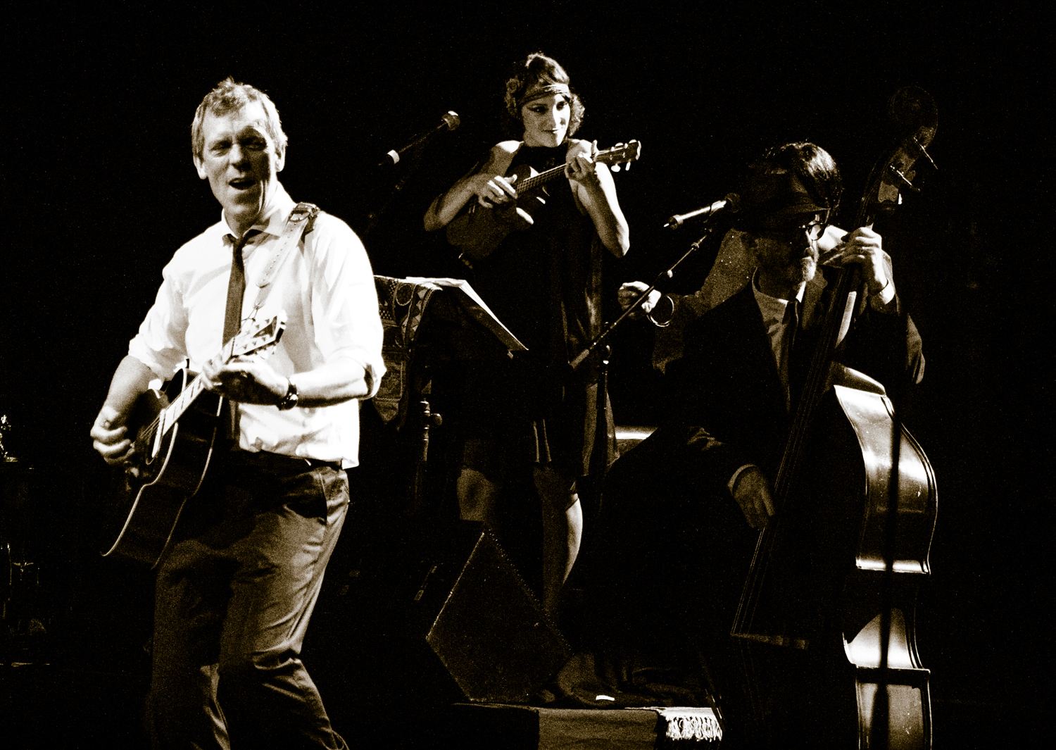 Hugh Laurie Gig in Belo Horizonte - Brazil